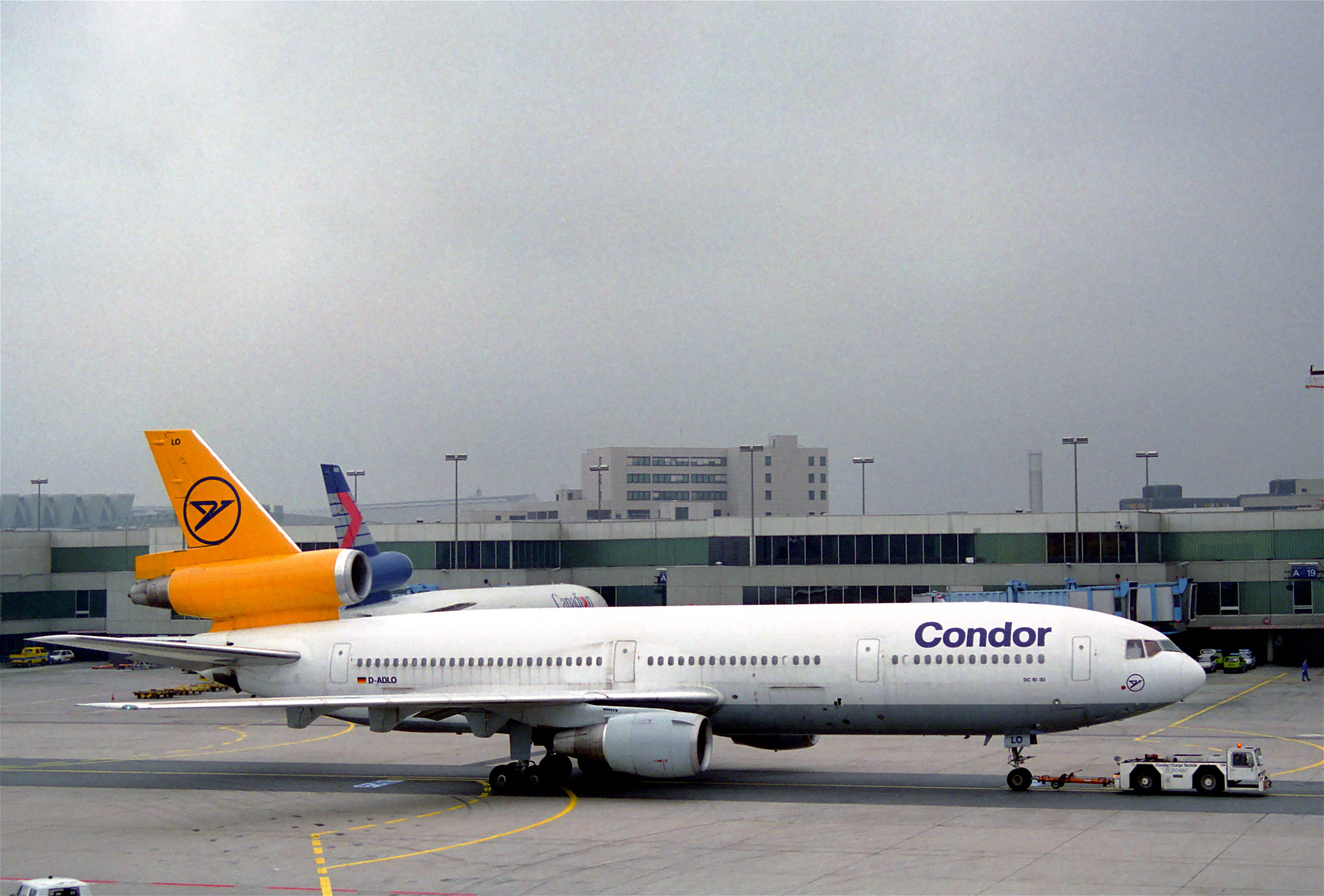 Condor DC-10-30; D-ADLO@FRA;11.10.1995